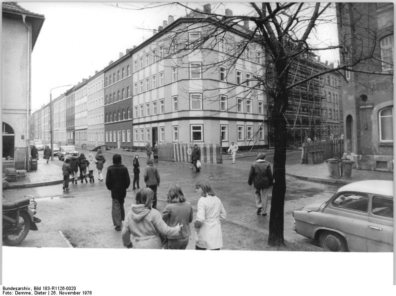 Erfurt, Adalbertstraße, Restaurierung von Altbauten ADN-ZB Demme 26.11.76 Erfurt: DDR-aktuell-Altbauten werden restauriert- 79 Wohnungen sind in der Adalbertstraße im Erfurter Norden rekonstruiert worden. Maurer, Klempner und Maler haben die Wohnungen, in denen fast zur Hälfte betagte Bürger leben, komplex modernisiert. Die Küchen erhielten Durchlauferhitzer, Gasherd und Spüle, außerdem haben die Wohnungen Bäder erhalten. Die Häuser in diesem Arbeiterviertel Erfurts wurden meist Ende des vergangenen Jahrhunderts gebaut. Bis 1980 sollen dort 1.000 Wohnungen modernisiert sein. (siehe 19 und 21N und ADN-Serie)